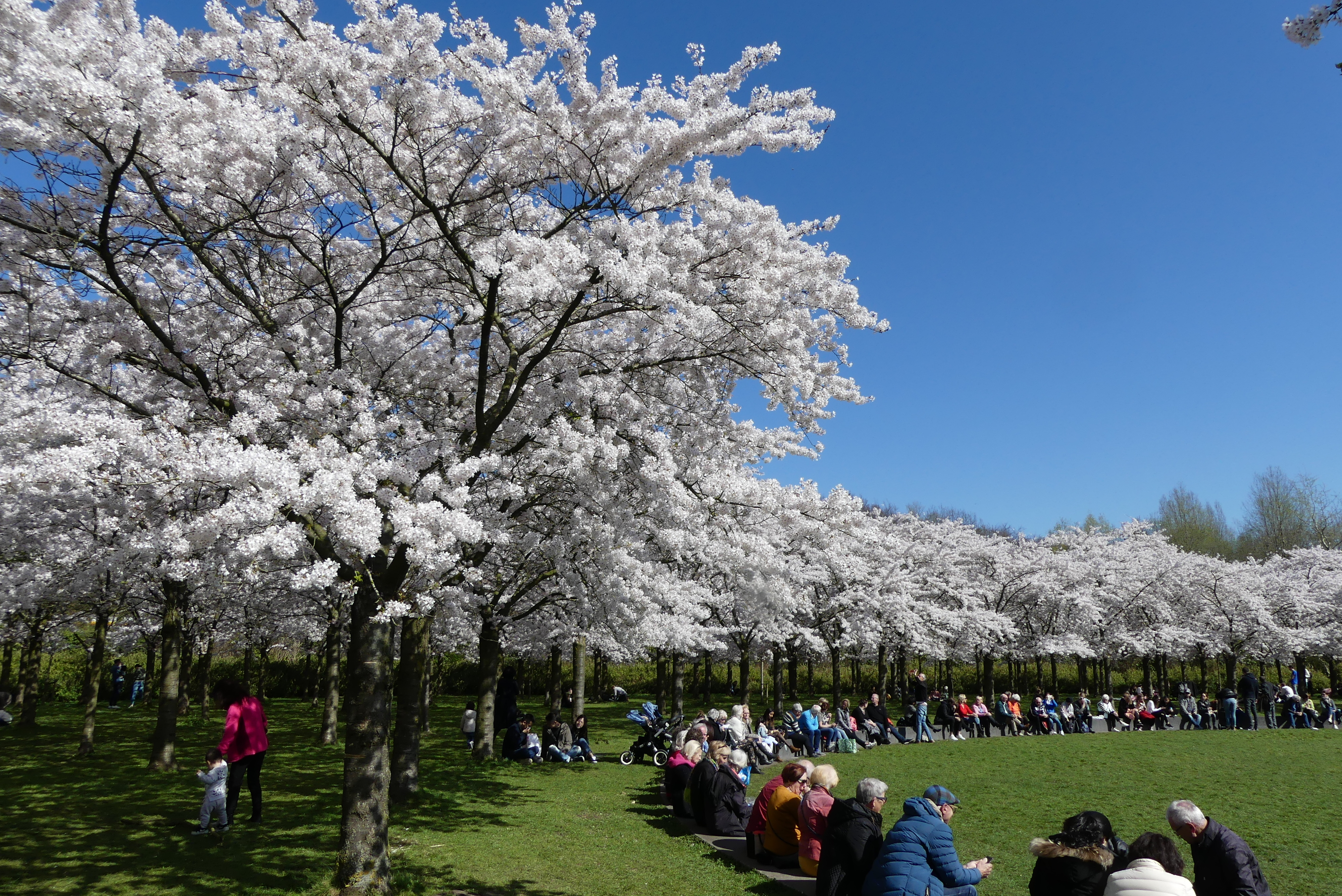 Zicht op een deel van het Kersenbloemsempark in het Amsterdamse Bos